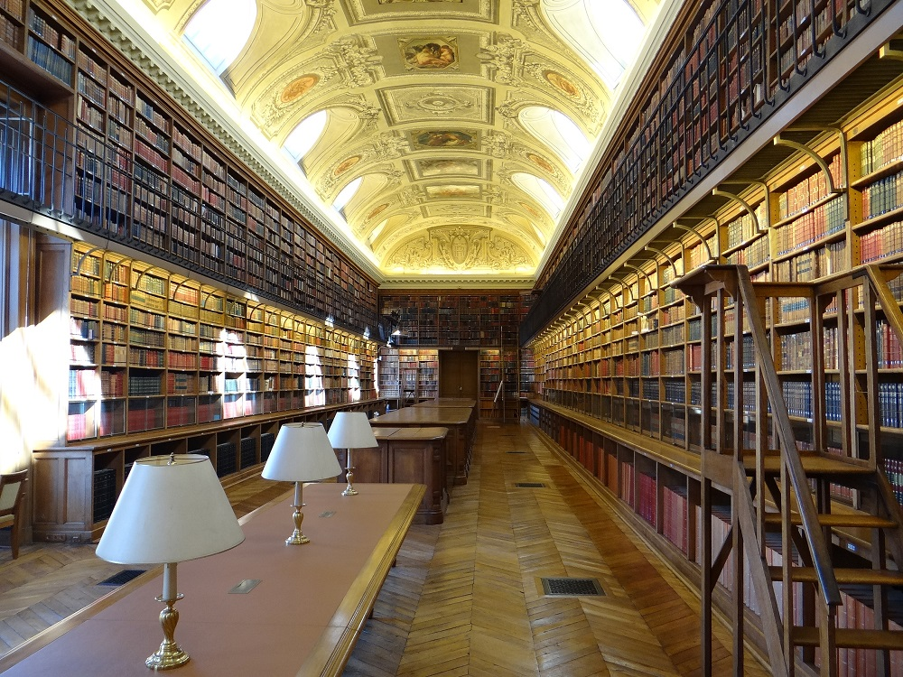 Palais du Luxembourg .